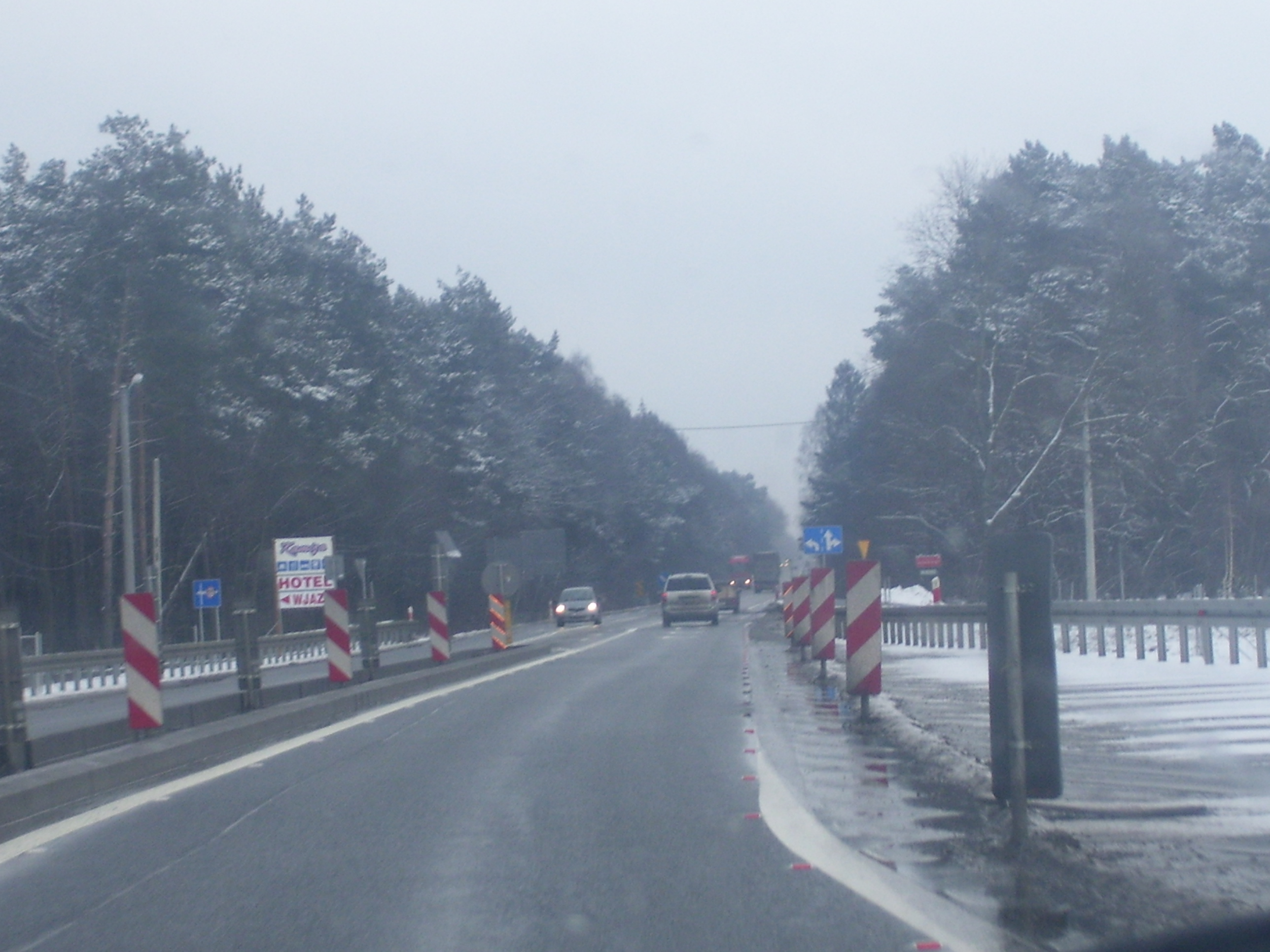 Wyjazd z obwodnicy Wyszkowa.